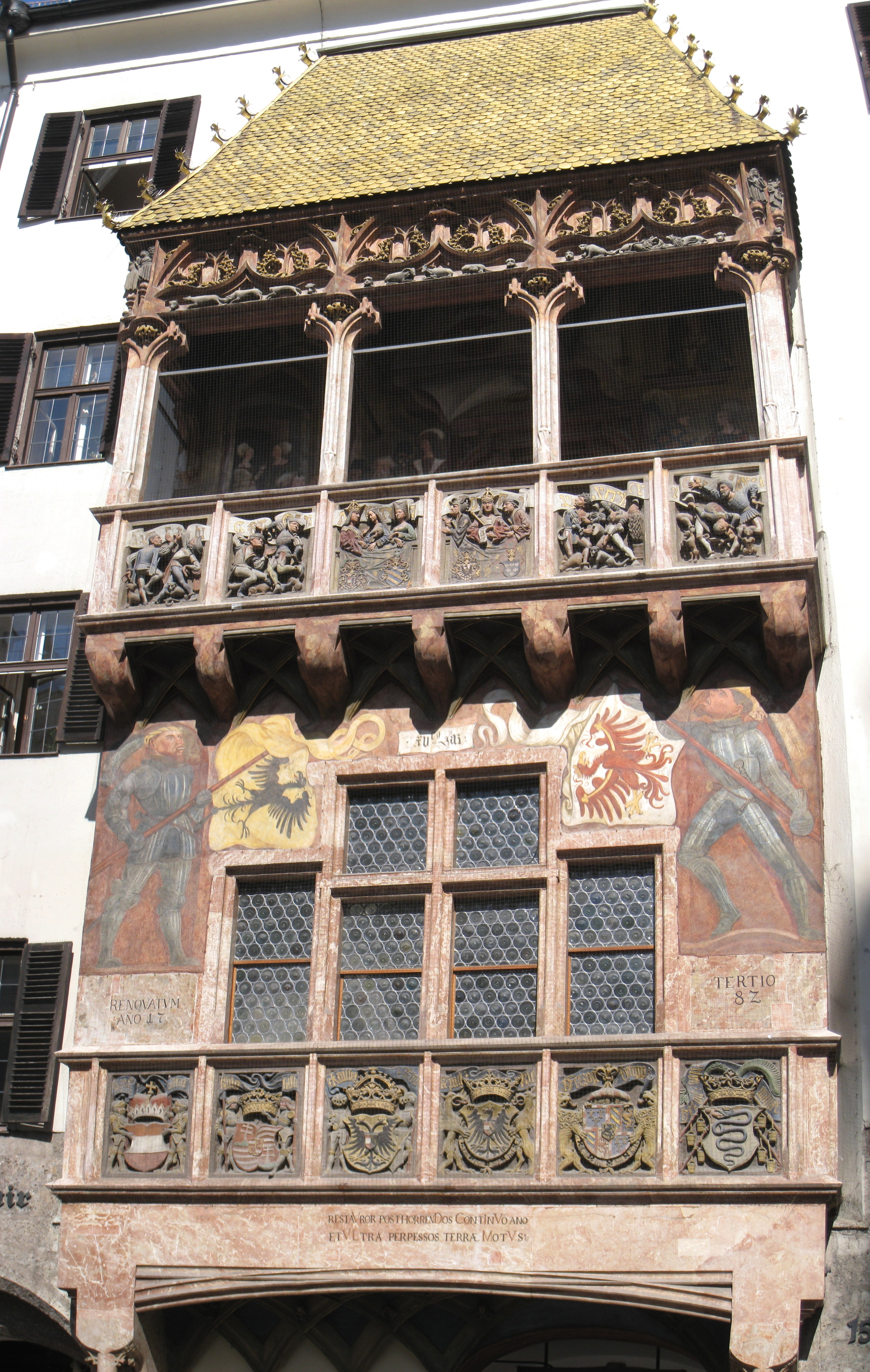 Goldenes Dachl, Innsbruck, Austria - facade.